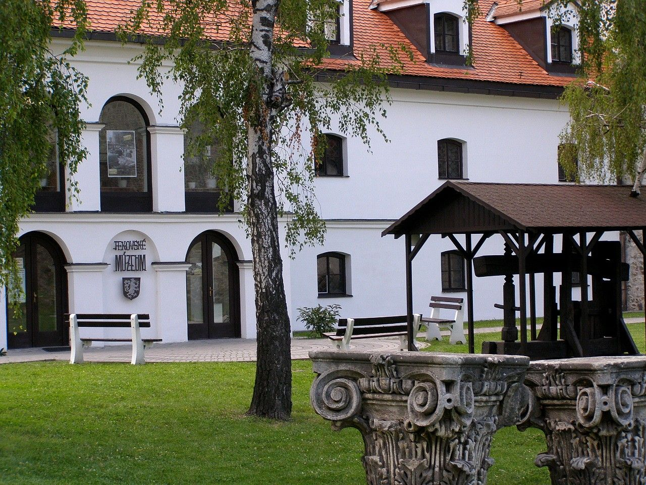 Levický hrad - Tekovské múzeum